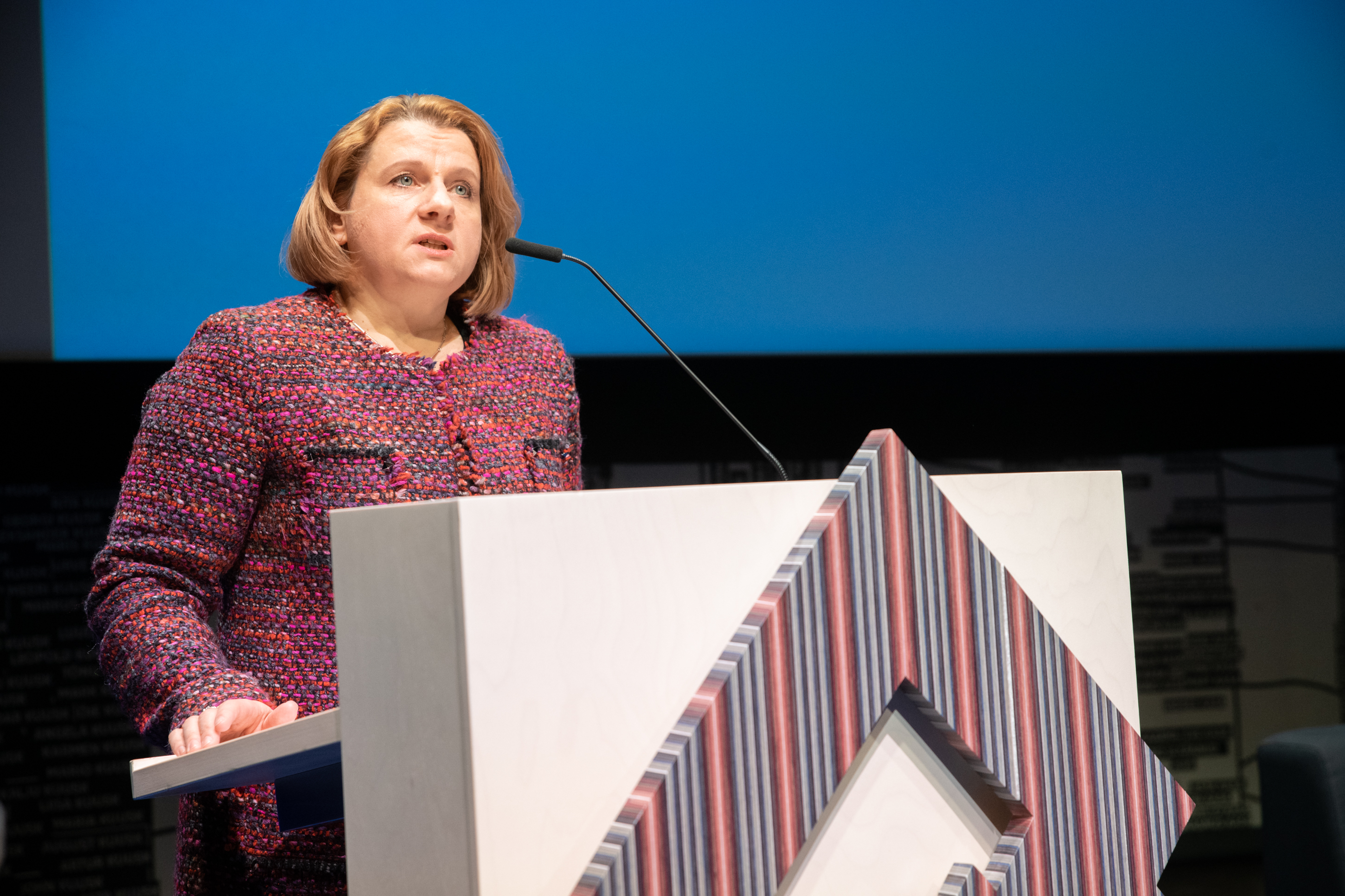 Heli Tiirmaa-Klaar, Tartu rahu 100 küberjulgeoleku ja rahvusvahelise õiguse seminar